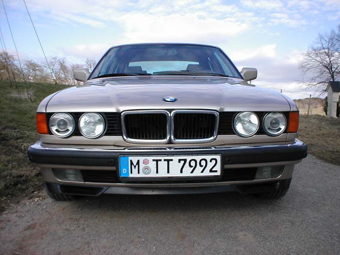 Eigener PKW, selbst photographiert im Frühjahr 2004 bei Tettnang. Auf dem Photo ist die gegenüber den Sechszylindermodellen verbreiterte BMW-Niere der Acht- und Zwölfzylindermodelle gut zu erkennen. Es handelt sich hierbei um einen BMW E32 740i (Motor M60B40, V8).